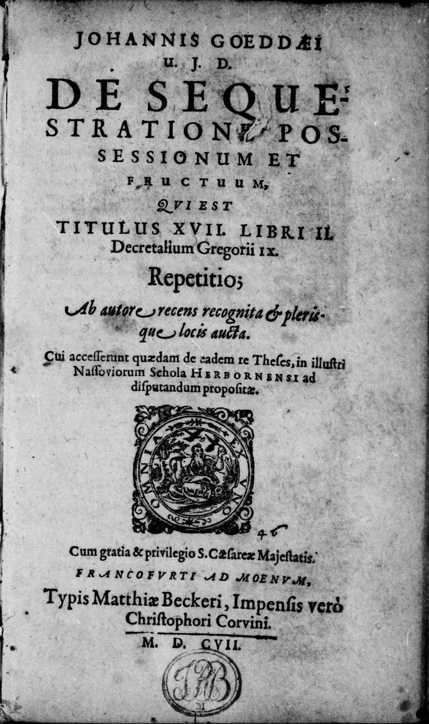 Frontespizio